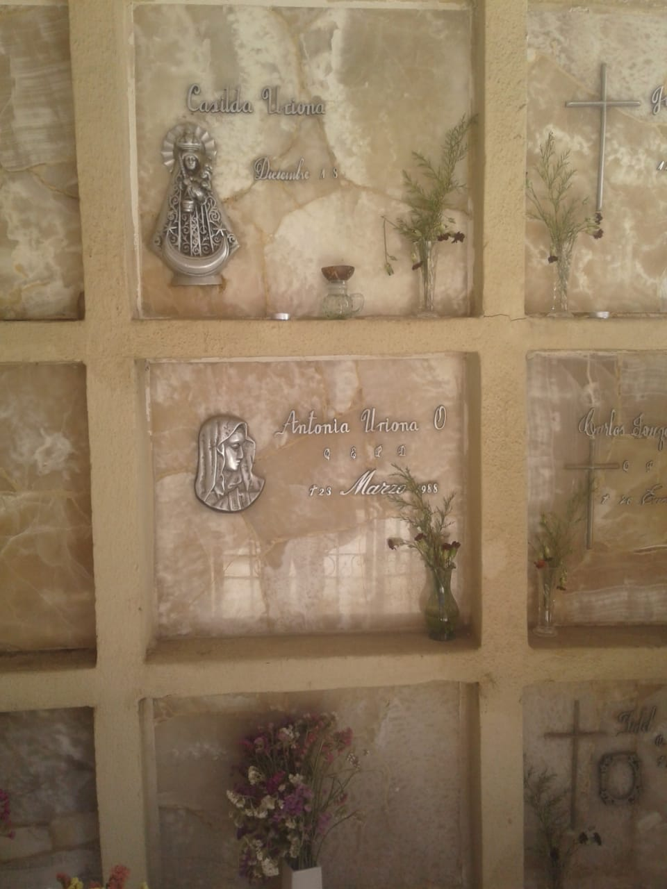 dentro del mausoleo